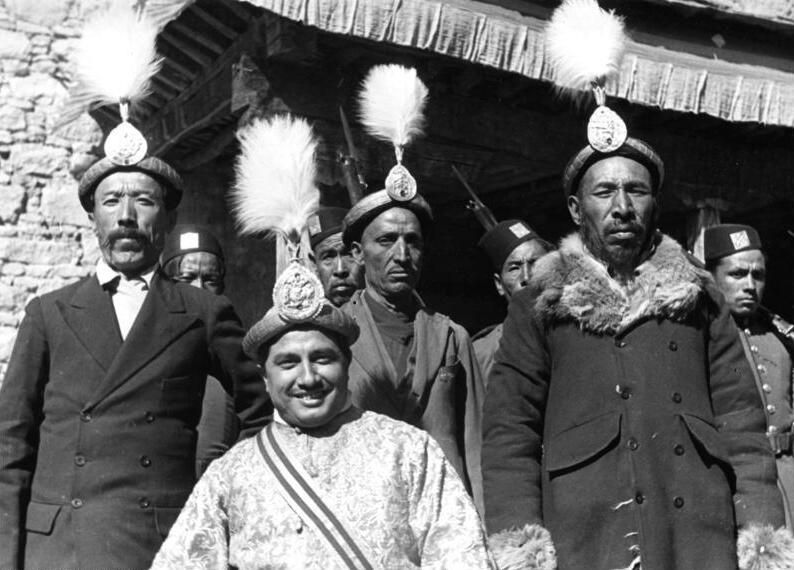 Lhasa, der Gesandte Nepals mit seinen Sekretären